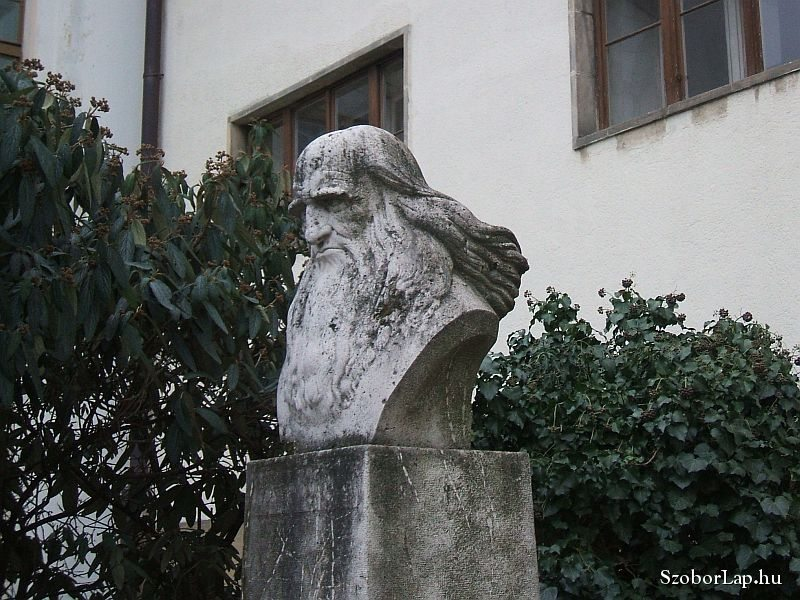 Leonardo da Vinci szobra Pécsett, a Nagy Lajos Gimnázium előtt. Baksa Soós György alkotása